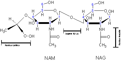 rappresentazioe schematica dell'interazione nam nag nella formazione della mureina